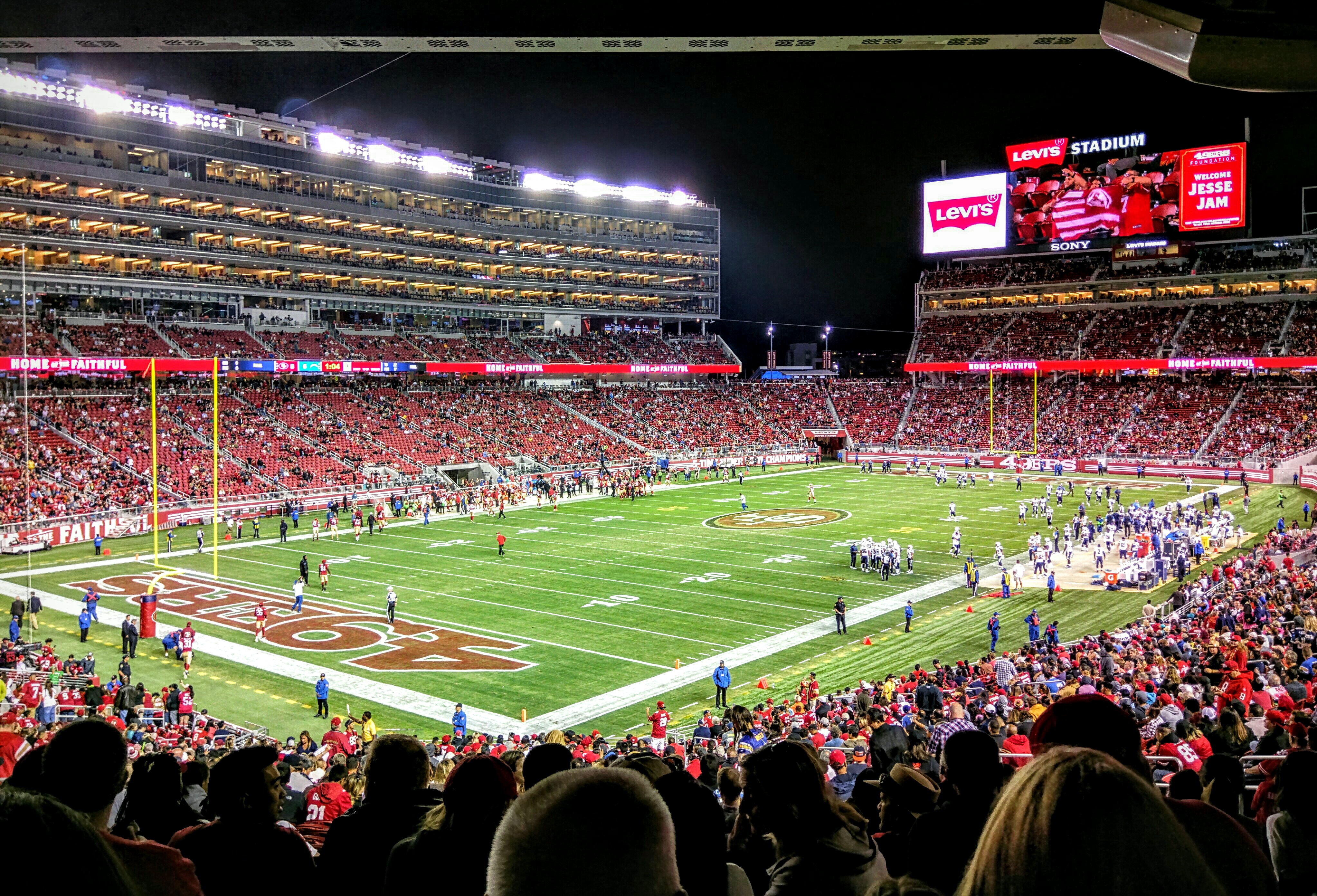 Santa Clara, California